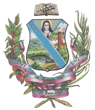 Escudo del municipio Independencia, estado Miranda, Venezuela